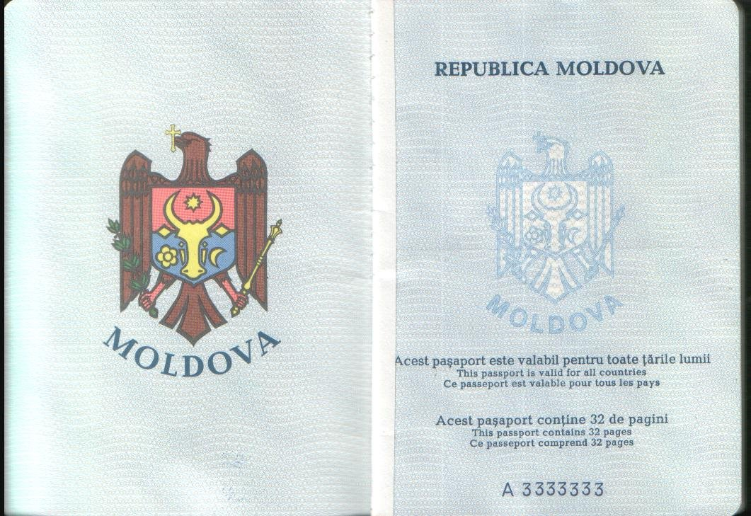 первая страница молдавского загранпаспорта